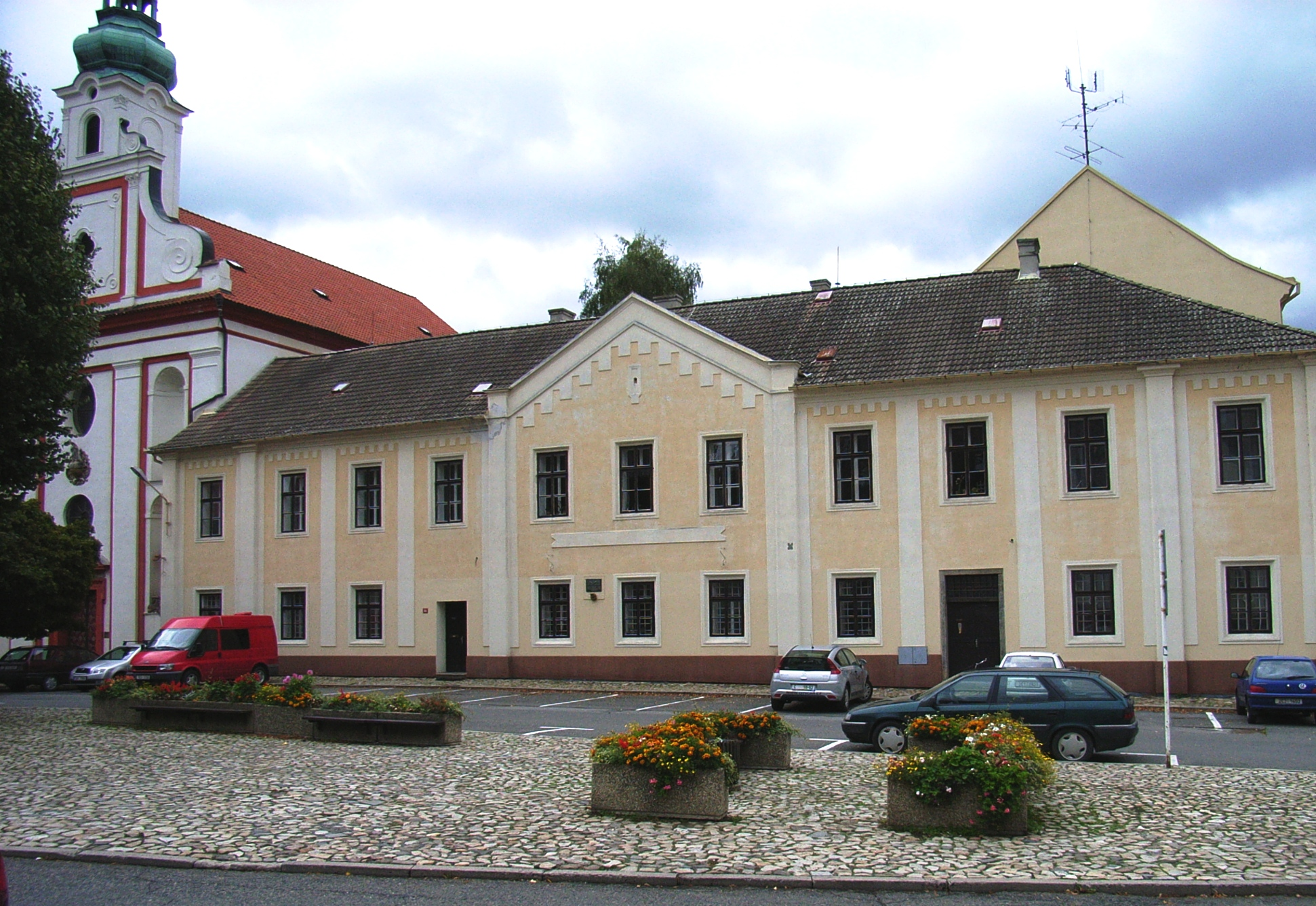 Bývalá Krajská věznice v Táboře (náměstí Mikuláše z Husi) s pam.deskou J.Vackovi